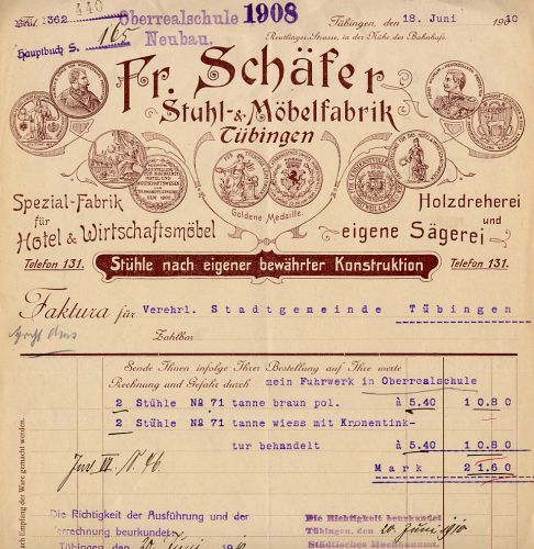 Rechnung von Fr. Schäfer Tübingen